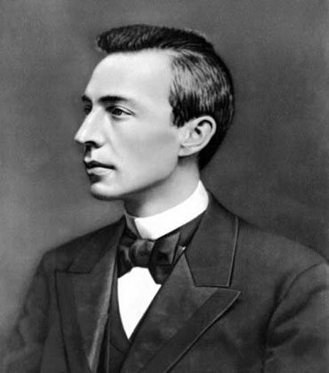 Рахманінов Сергій Васильович